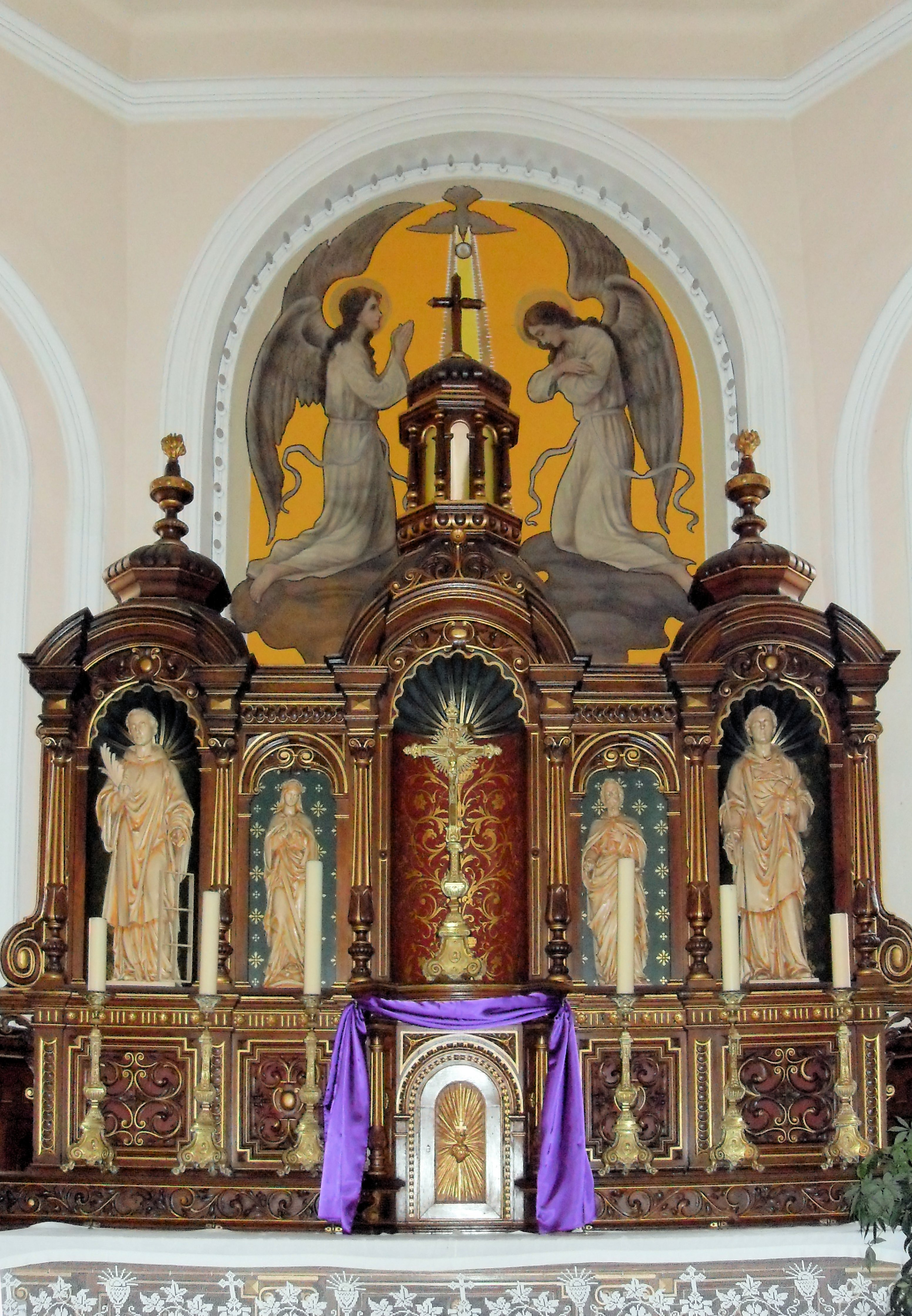 L'intérieur d'église Saint-Laurent à Goldbach-Altenbach